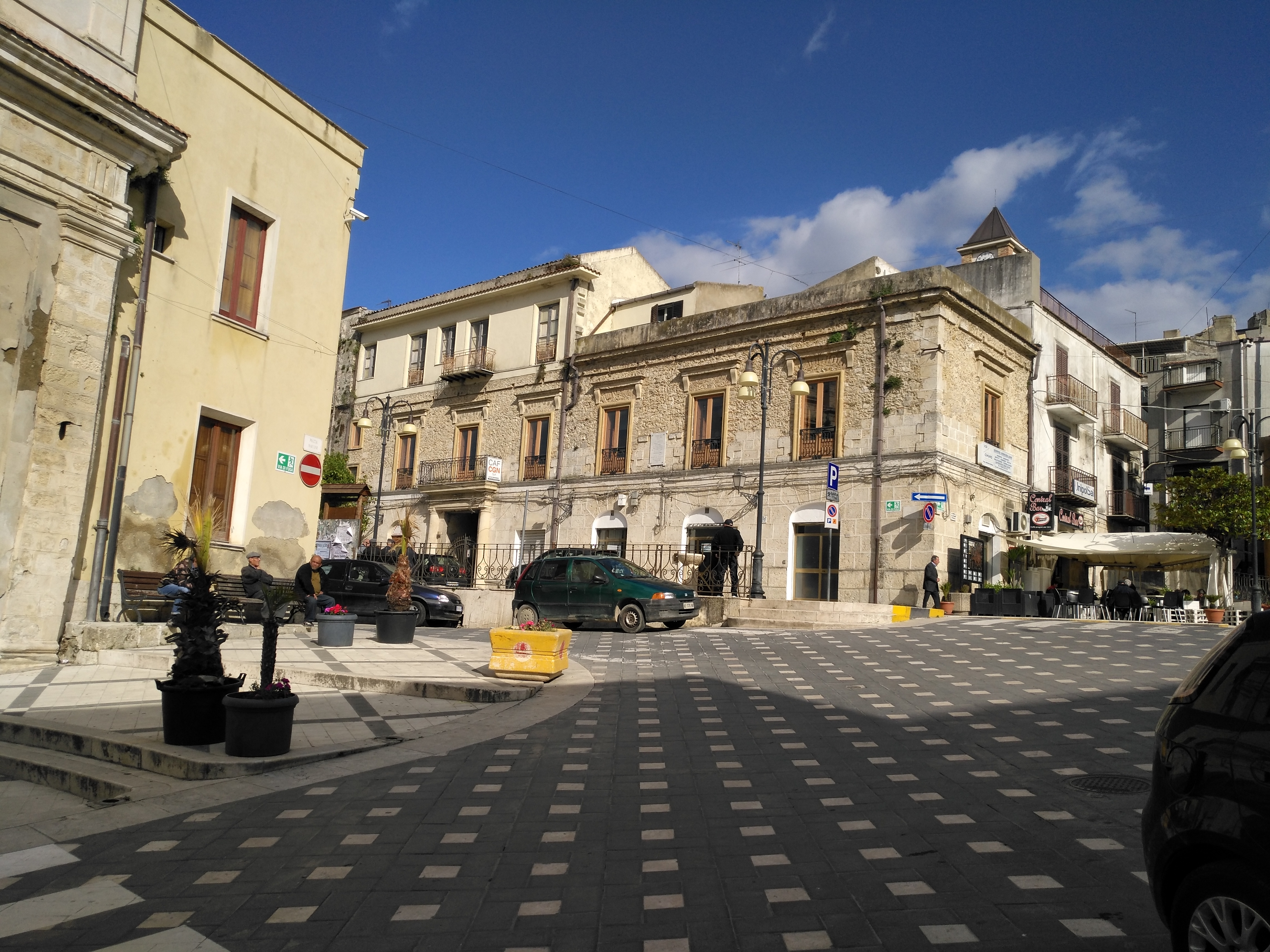 Piazza Marconi, la piazza principale di Grotte